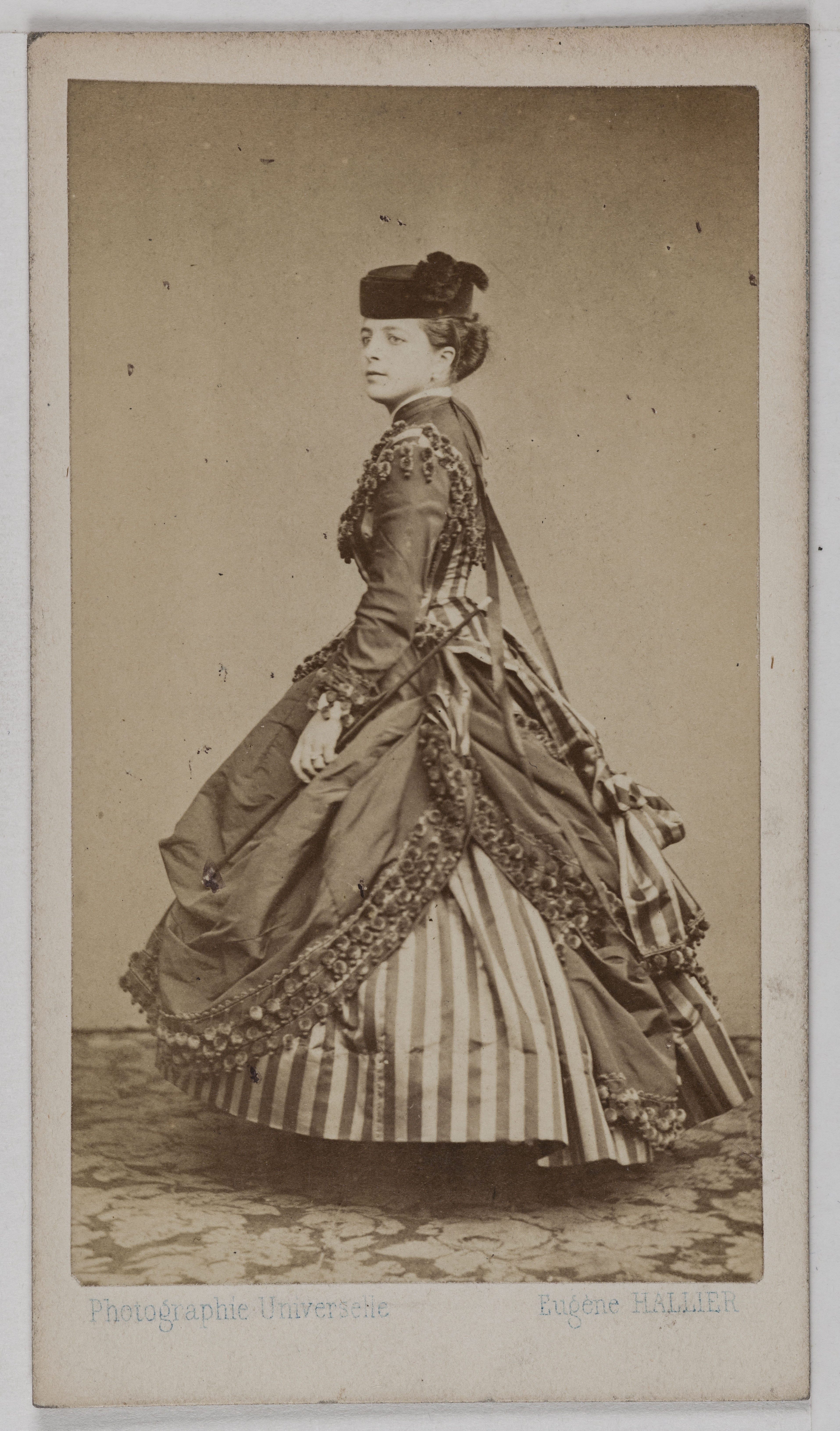 Pose de l'actrice et "demi-mondaine" Joséphine Athalie Manvoy dans les studios parisiens du célèbre photographe Eugène Hallier.